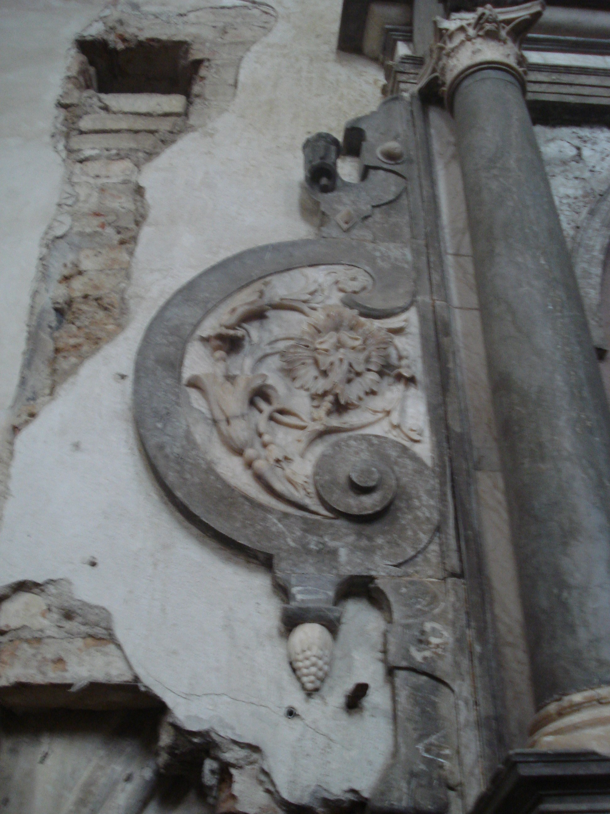 The Church of Saint Francis and Saint Bernardino in Vilnius (Šv. Pranciškaus ir Bernardino, arba Bernardinų, bažnyčia; Kościół Śww. Franciszka i Bernardyna; Maironio 10). Tombstone for Stanisław Radziwiłł (d. 1599), fragment. Created by Wilhelm van den Blocke, Danzig 1618-1623. Marmurinis renesansinis Stanislovo Radvilos Pamaldžiojo antkapis, seniausia Lietuvos profesionalioji apvaliosios skulptūros memorialinė kompozicija. Fragmentas